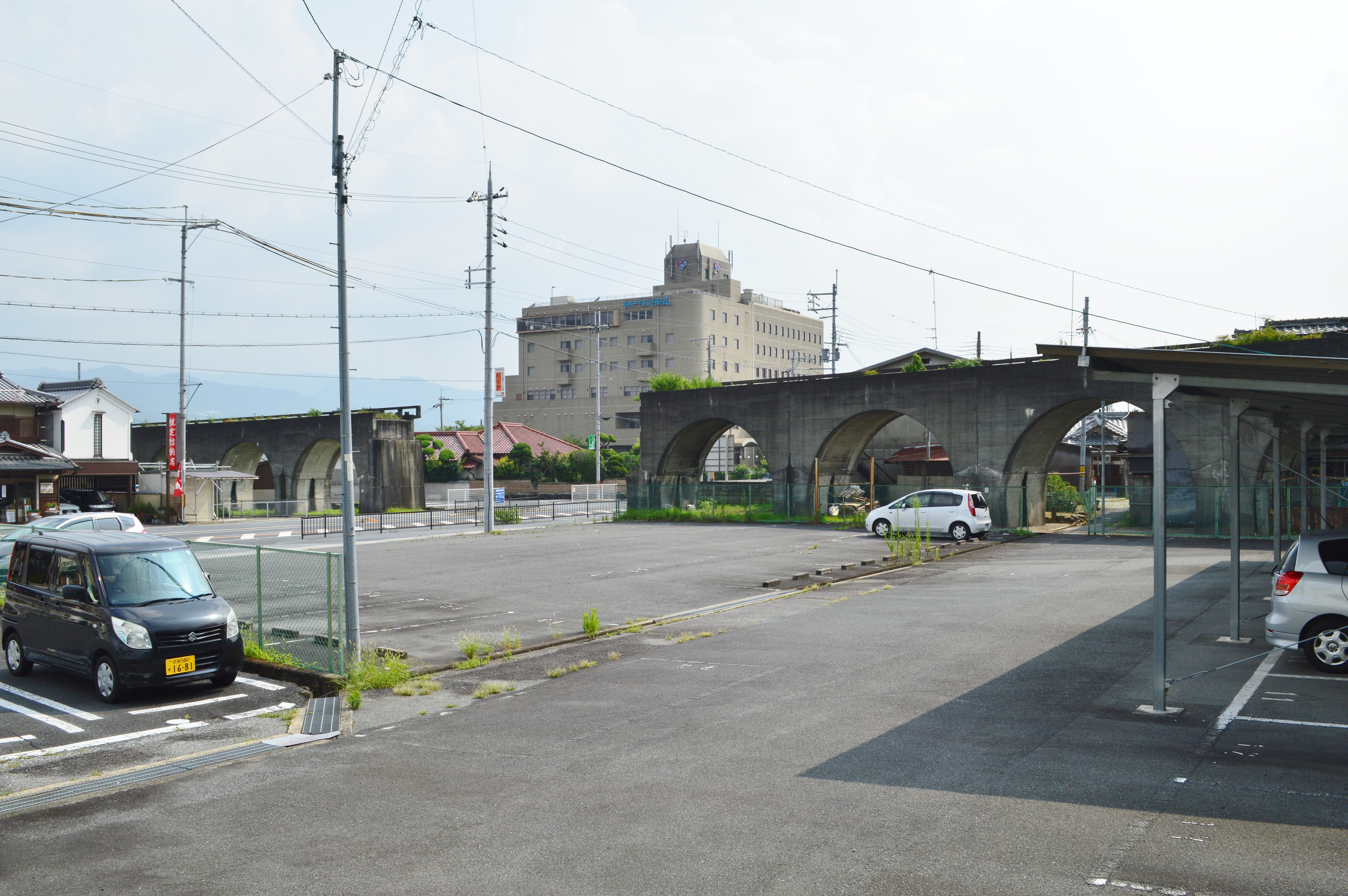 五新線未成線 国道24号橋梁部